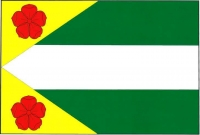 Lhotka (PR), vlajka. List tvoří dva žluté žerďové trojúhelníky sahající na horním a dolním okraji listu do poloviny délky listu a tři vodorovné pruhy, zelený, bílý a zelený. V trojúhelnících po červené růži. Poměr šířky k délce listu je 2 : 3.